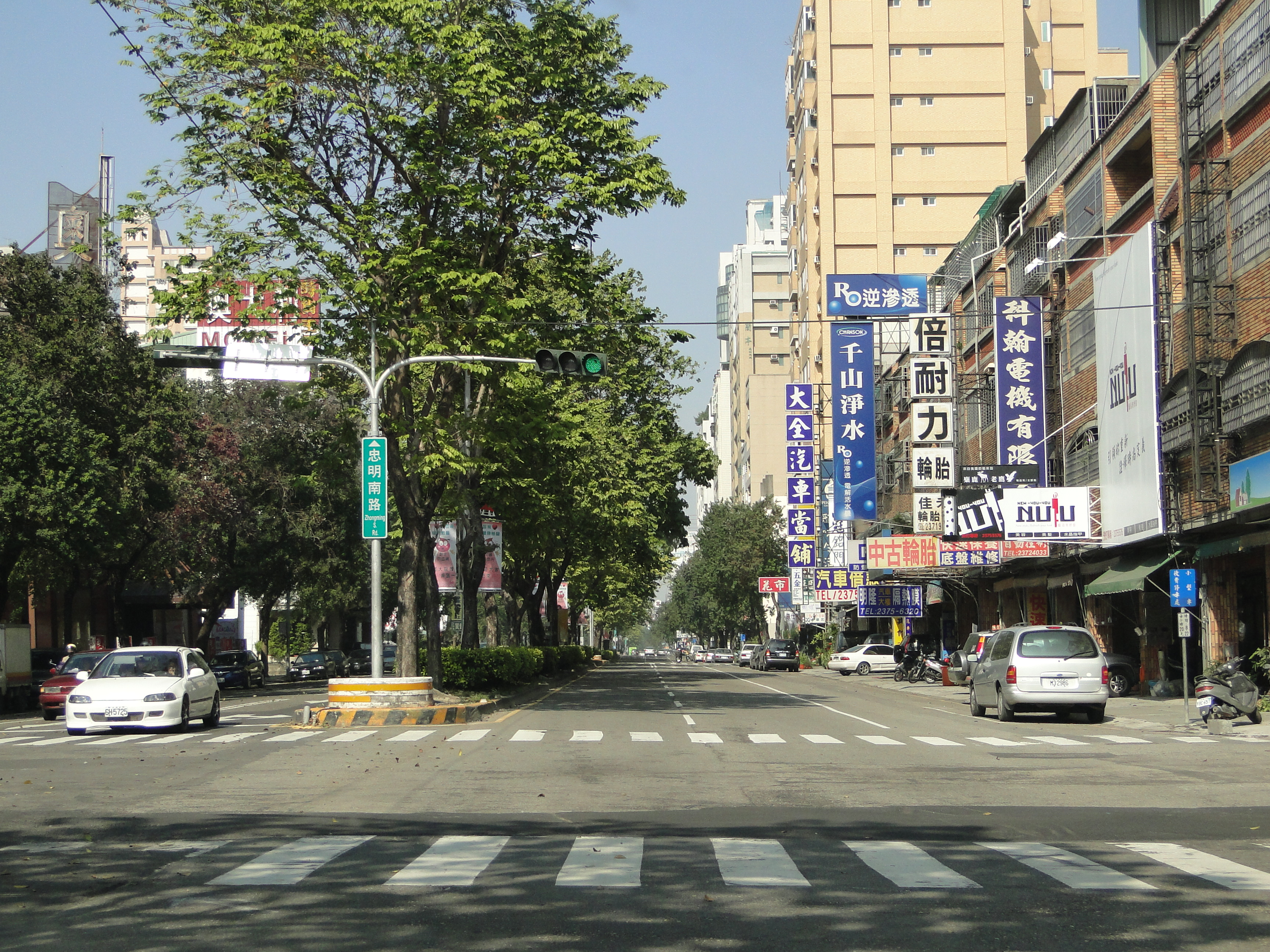 中文（台灣）: 台灣台中市忠明路一景。